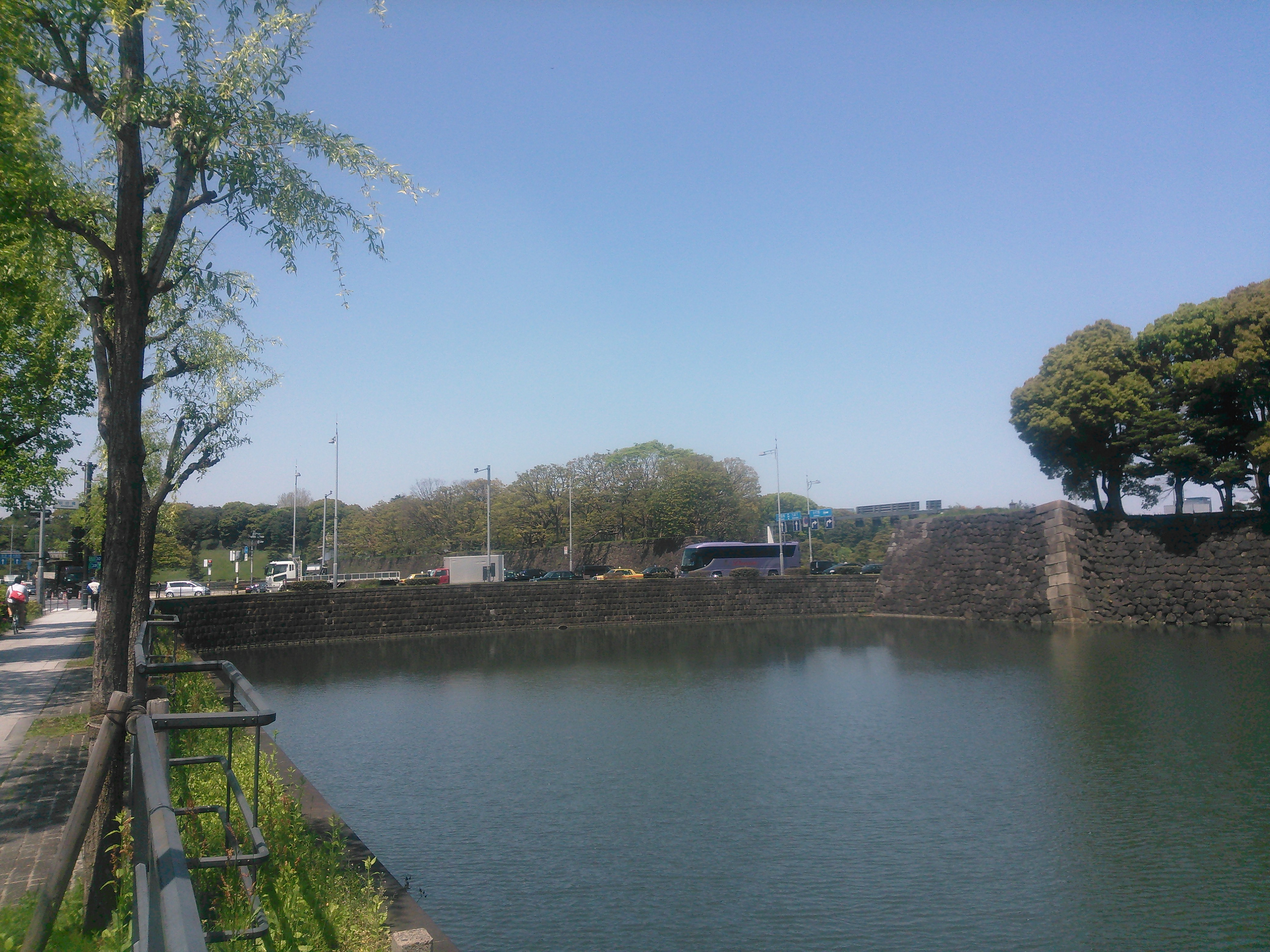 東京都千代田区霞が関一丁目・日比谷公園と皇居外苑の間にある、東京都道301号白山祝田田町線の祝田橋。手前は日比谷濠。